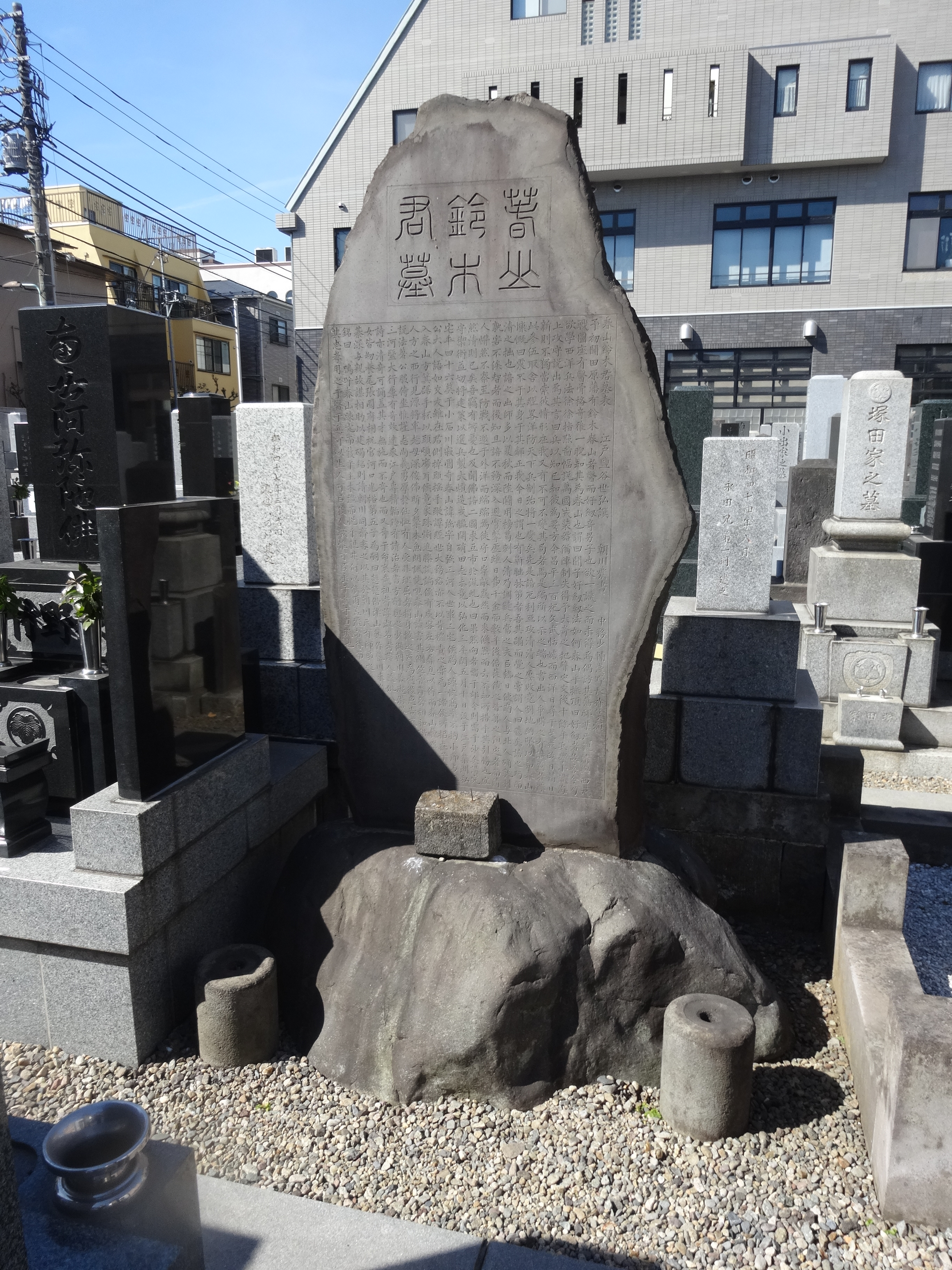 兵学者・田原藩医の鈴木春山（1801-46）墓碑。東京都文京区白山の寂圓寺墓地に所在。碑文は塩谷宕陰、篆額は浅野長祚による。